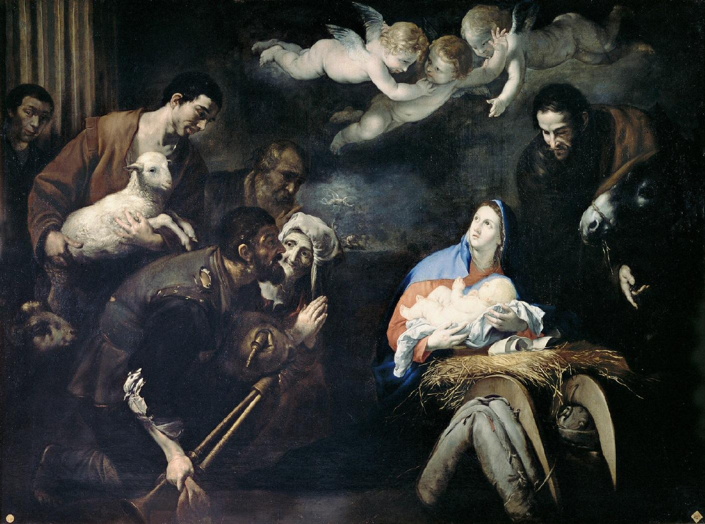 La obra representa el momento en que el Niño Jesús fue adorado por los pastores de Belén poco después de su nacimiento.